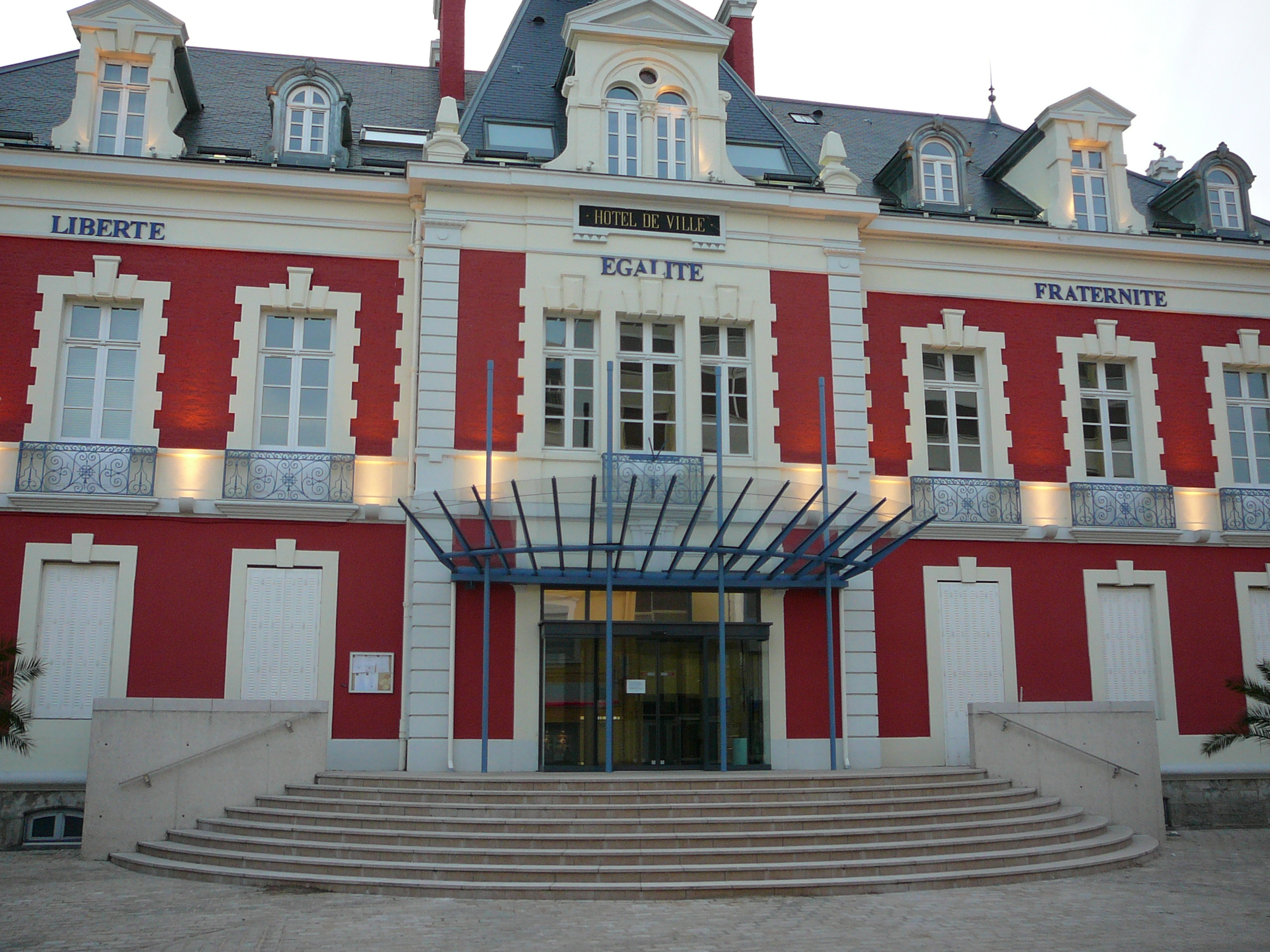 Photo de nuit de la mairie de la ville de Montceau les mines